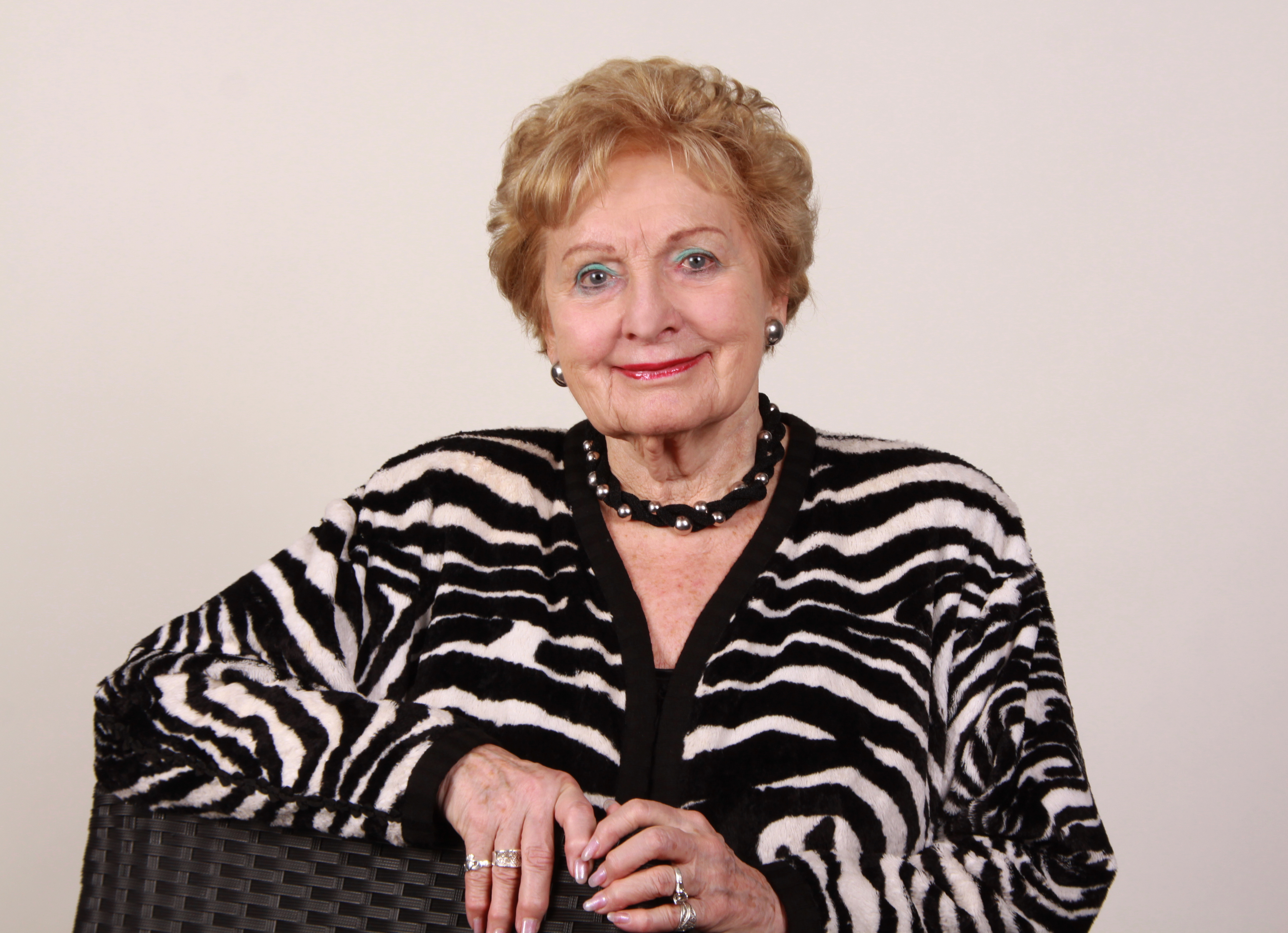 Abgeordnete/r Europaparlament